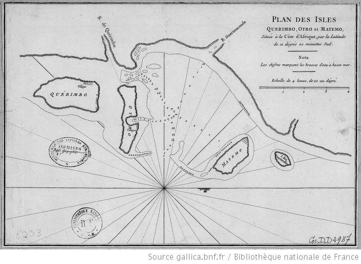 Plan des Îsles Querimbo, Oybo et Matemo, situés à la côte d'Afrique, par la latitude de 12 degrés 20 minuttes sud